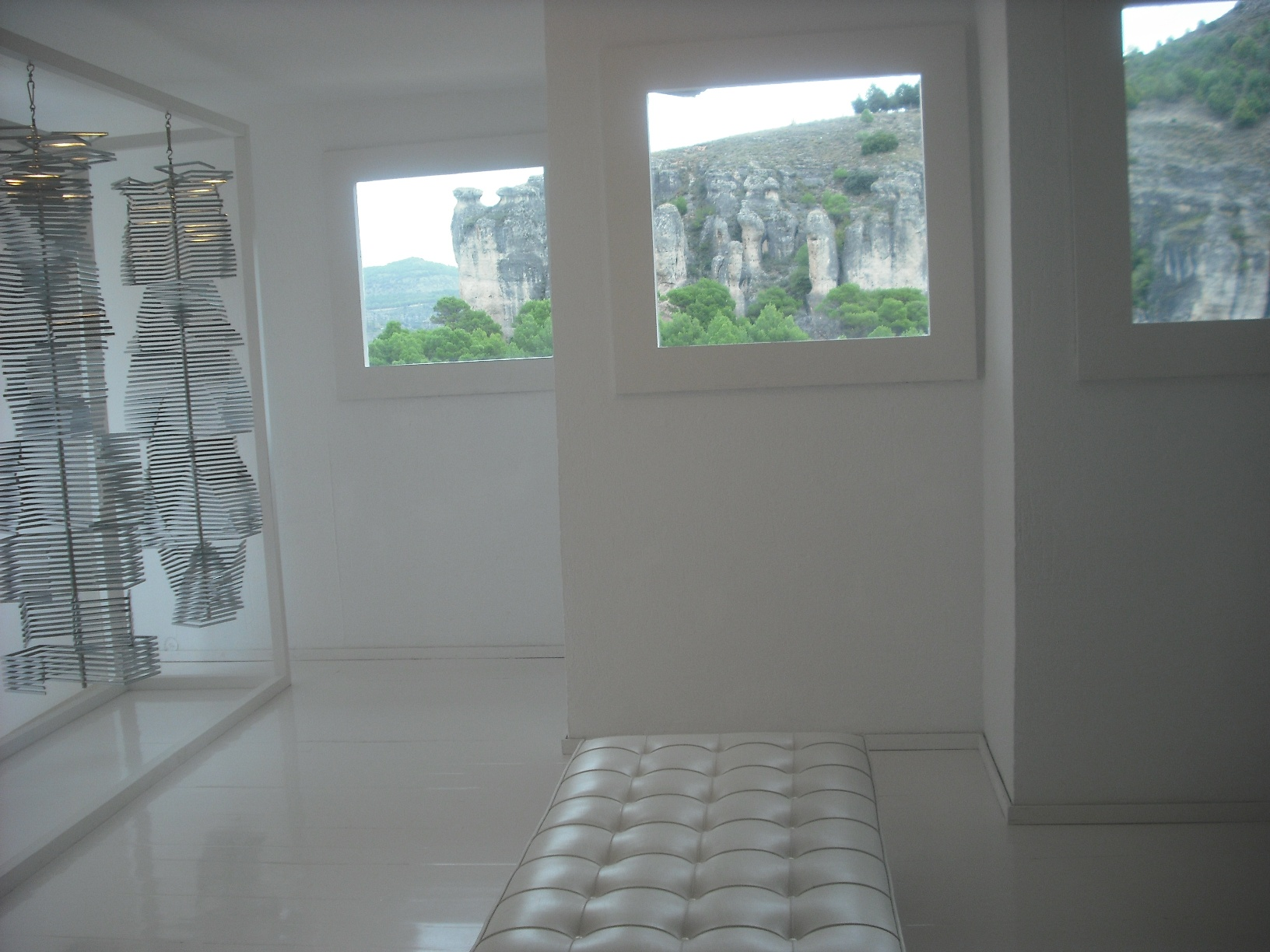 Vistas desde el Museo de Arte Abstracto Español.